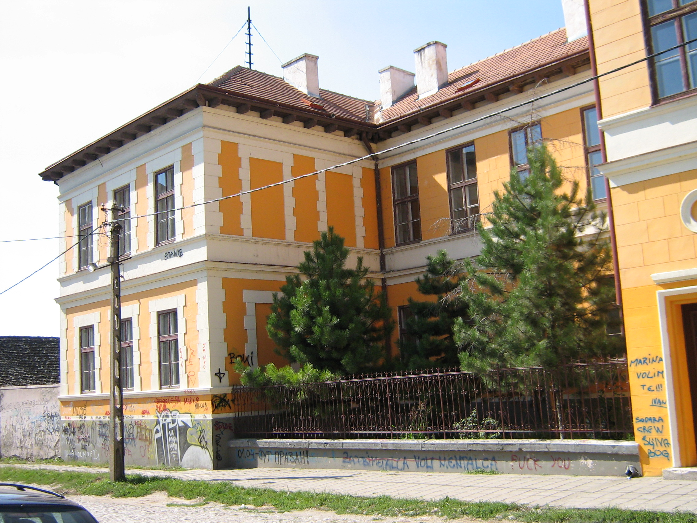 Gymnasium "Uroš Predić" in Pančevo